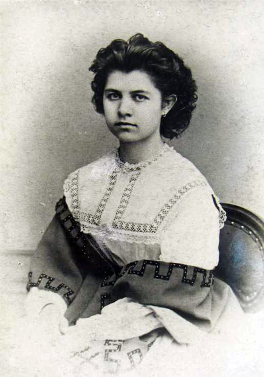 Олена Пчілка